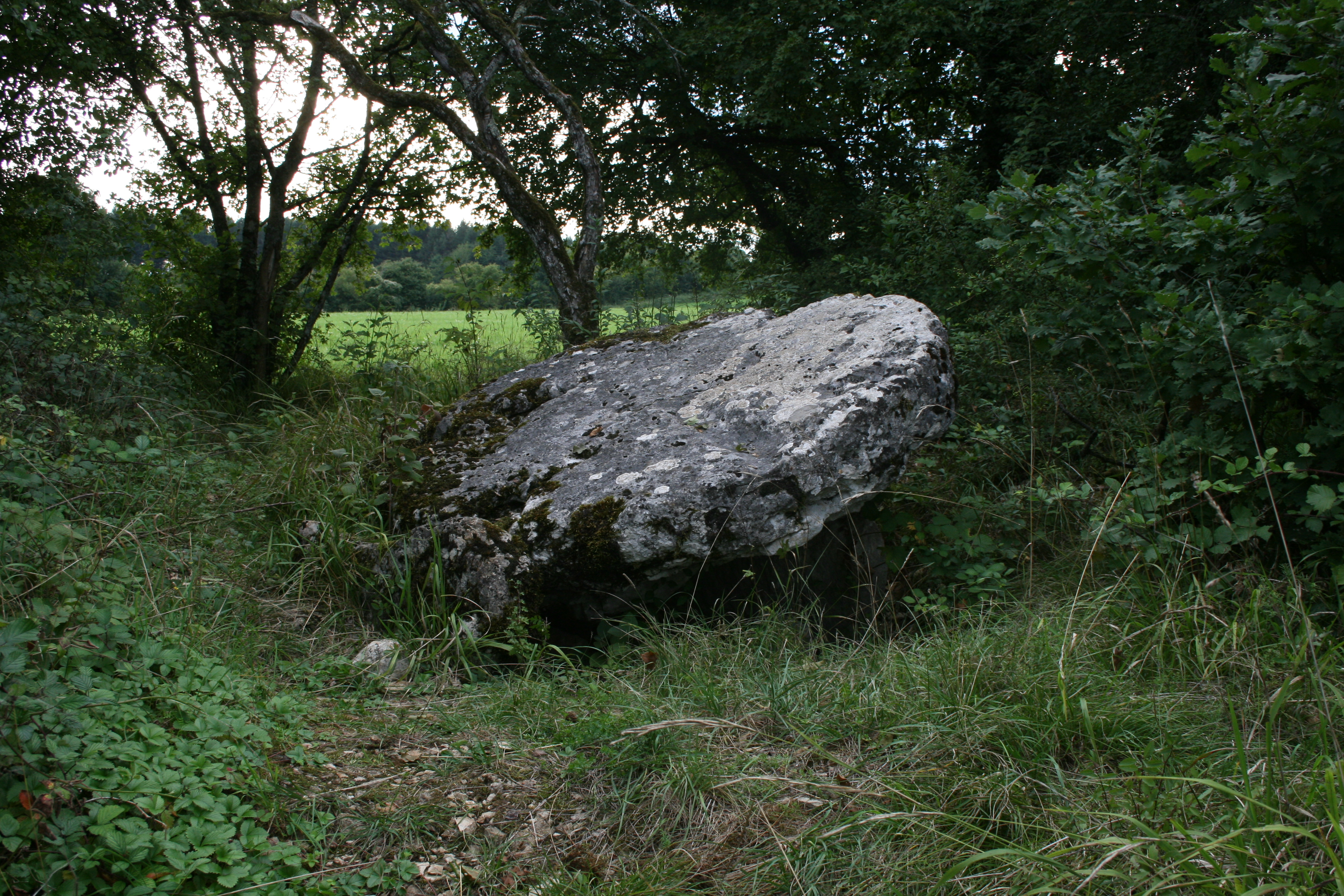 Dolmen de Colombe les Vesoul ( Haute-saône )